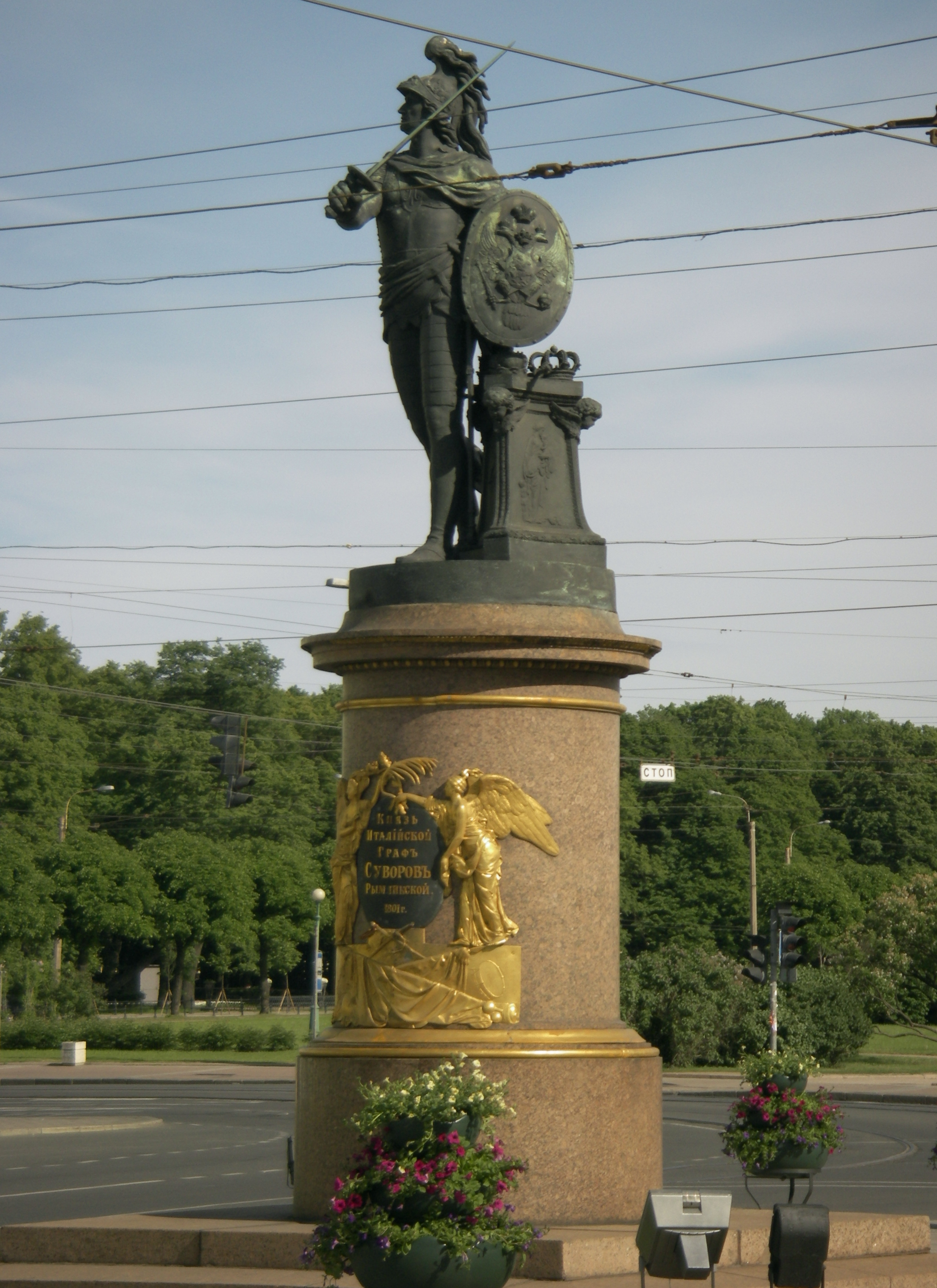 Памятник Суворову возле троицкого моста, Санкт-Петербург. (Monument to Suvorov before Trinity Bridge, St Petersburg.) 1801 г. Надпись под памятником: Князь Италiйской Графъ Суворовъ Рымникской.